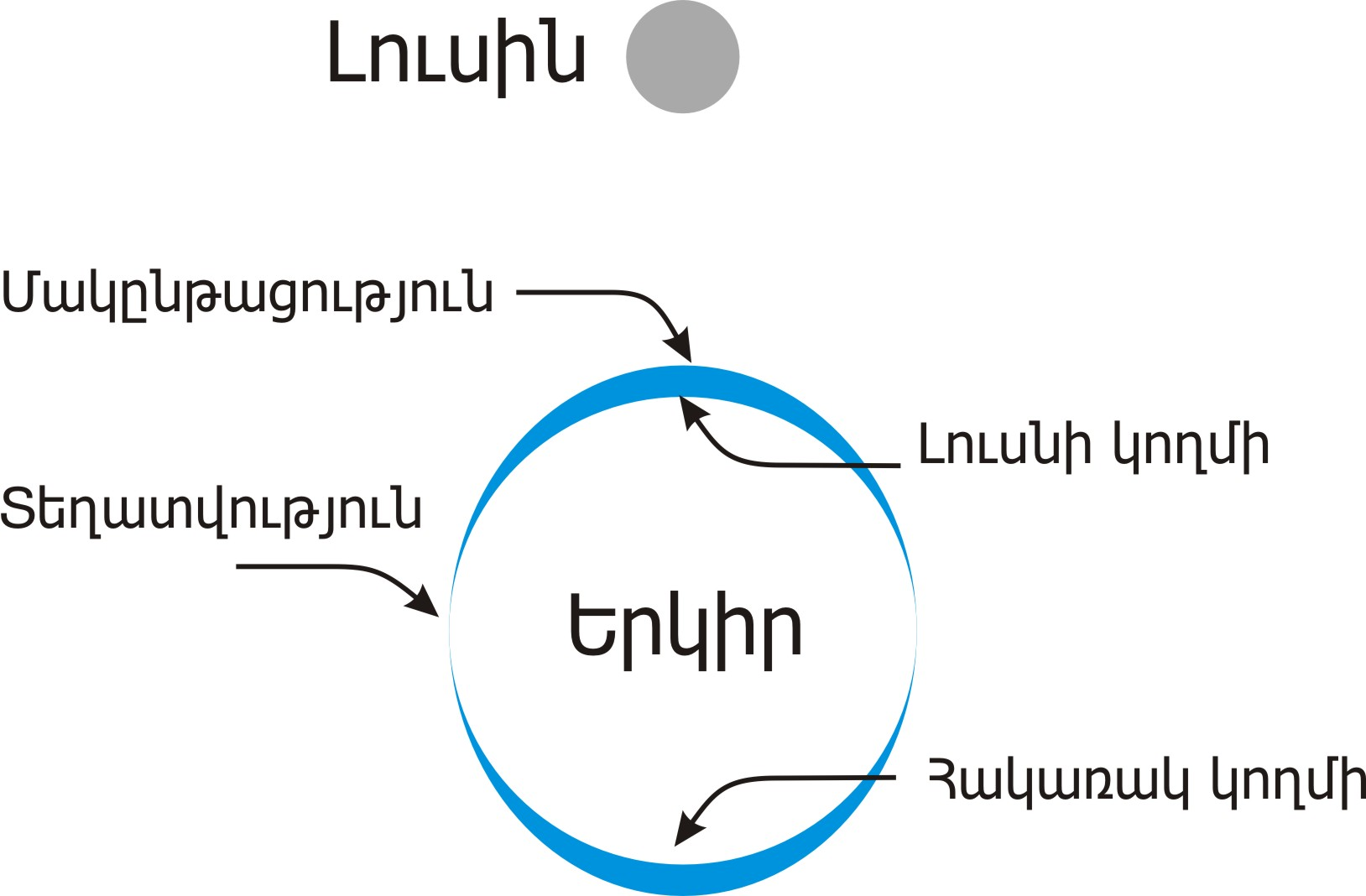 Մակընթացությունների կախումը լուսնից